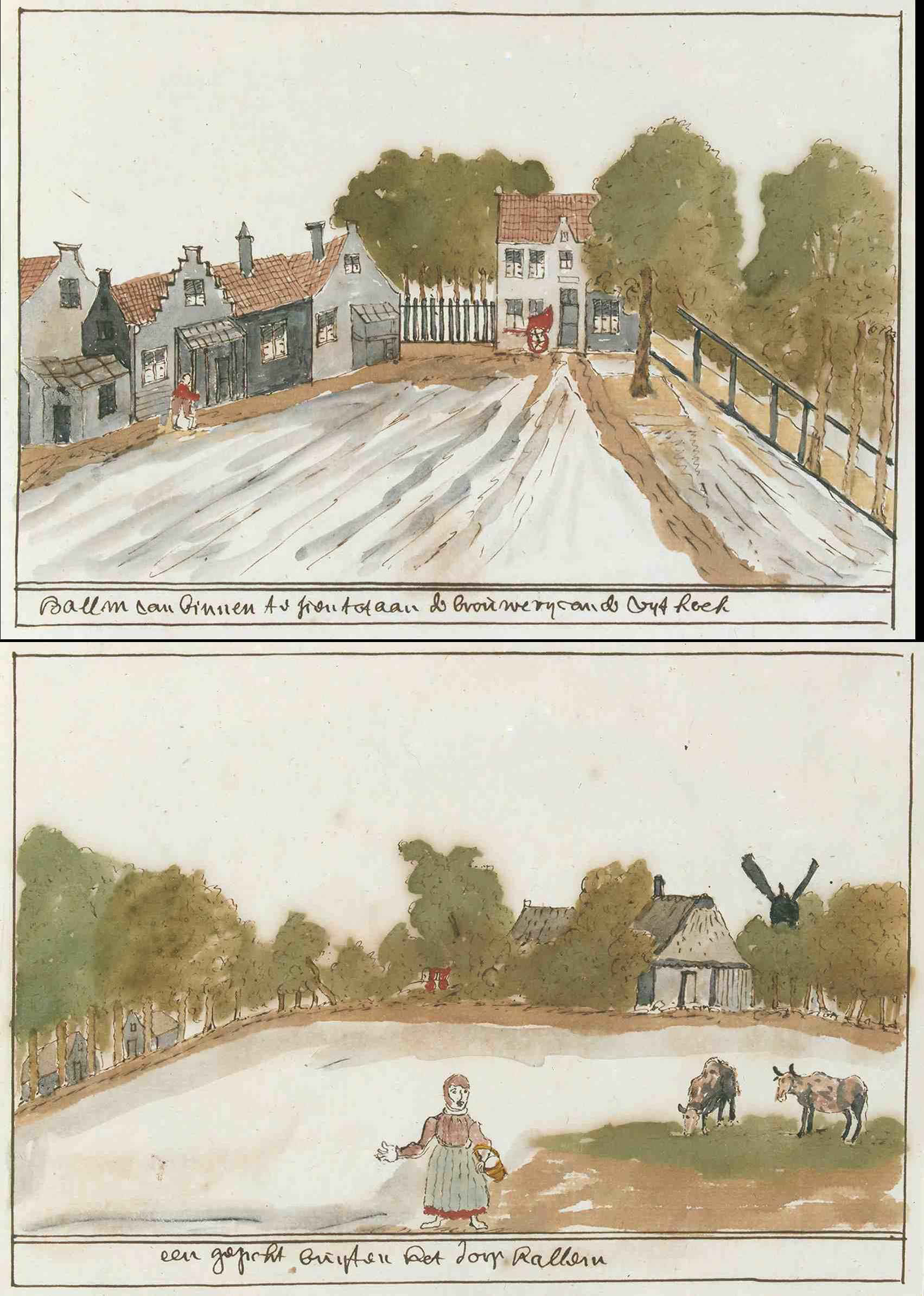 Korte Beschreijving van de Steden Dorpen Gehugten en Heeren-huizen der Heerlykheid Vriesland Benevens Desselfs Afbeeldingen Meest na 't leven getekent By een Vergaderdt Door Andries Schoemaker